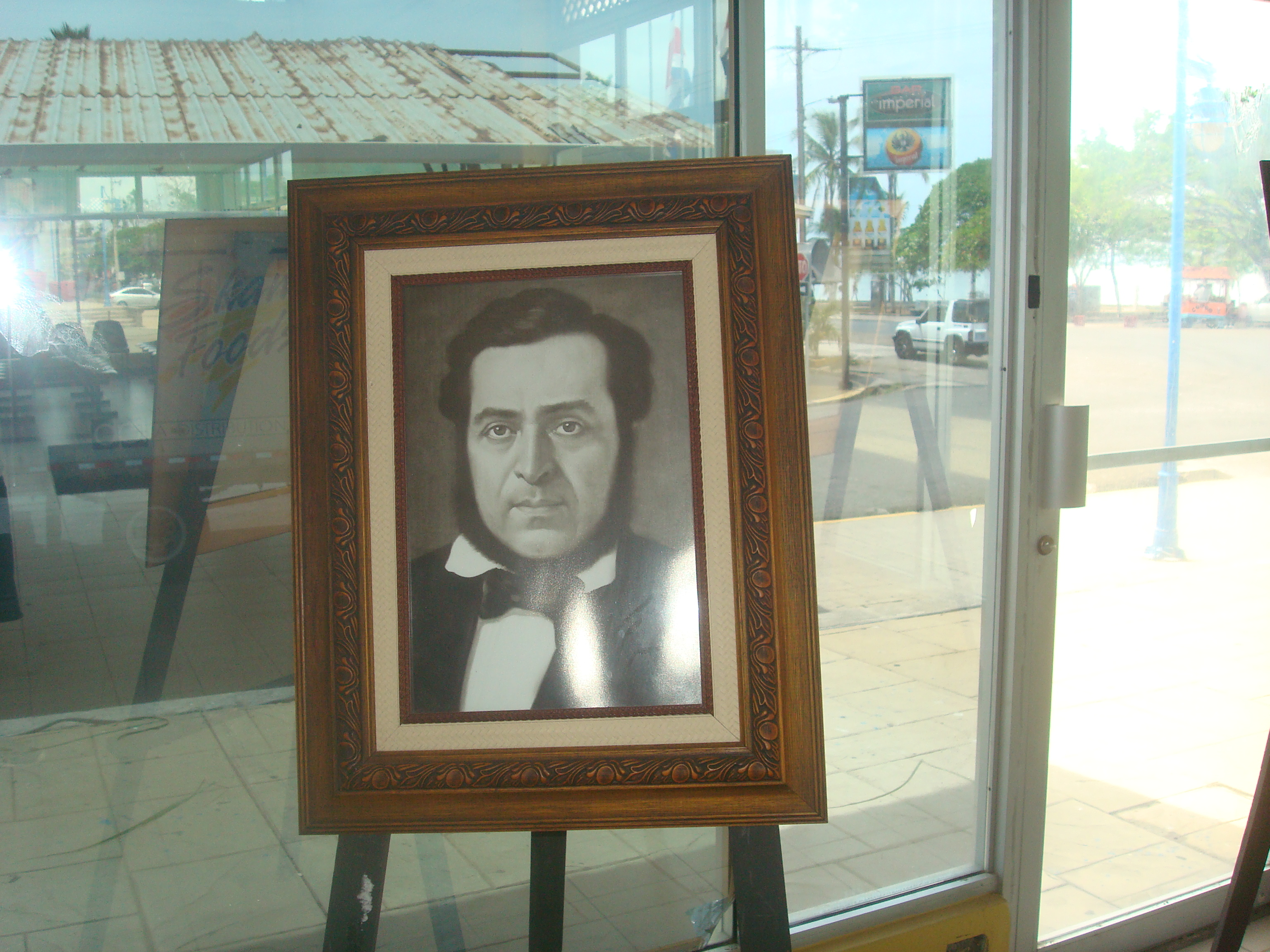 Retrato del ex-presidente costarricense Juan Rafael Mora Porras en la oficina del Instituto Costarricense de Turismo (antigua aduana) en la ciudad de Puntarenas, Costa Rica.